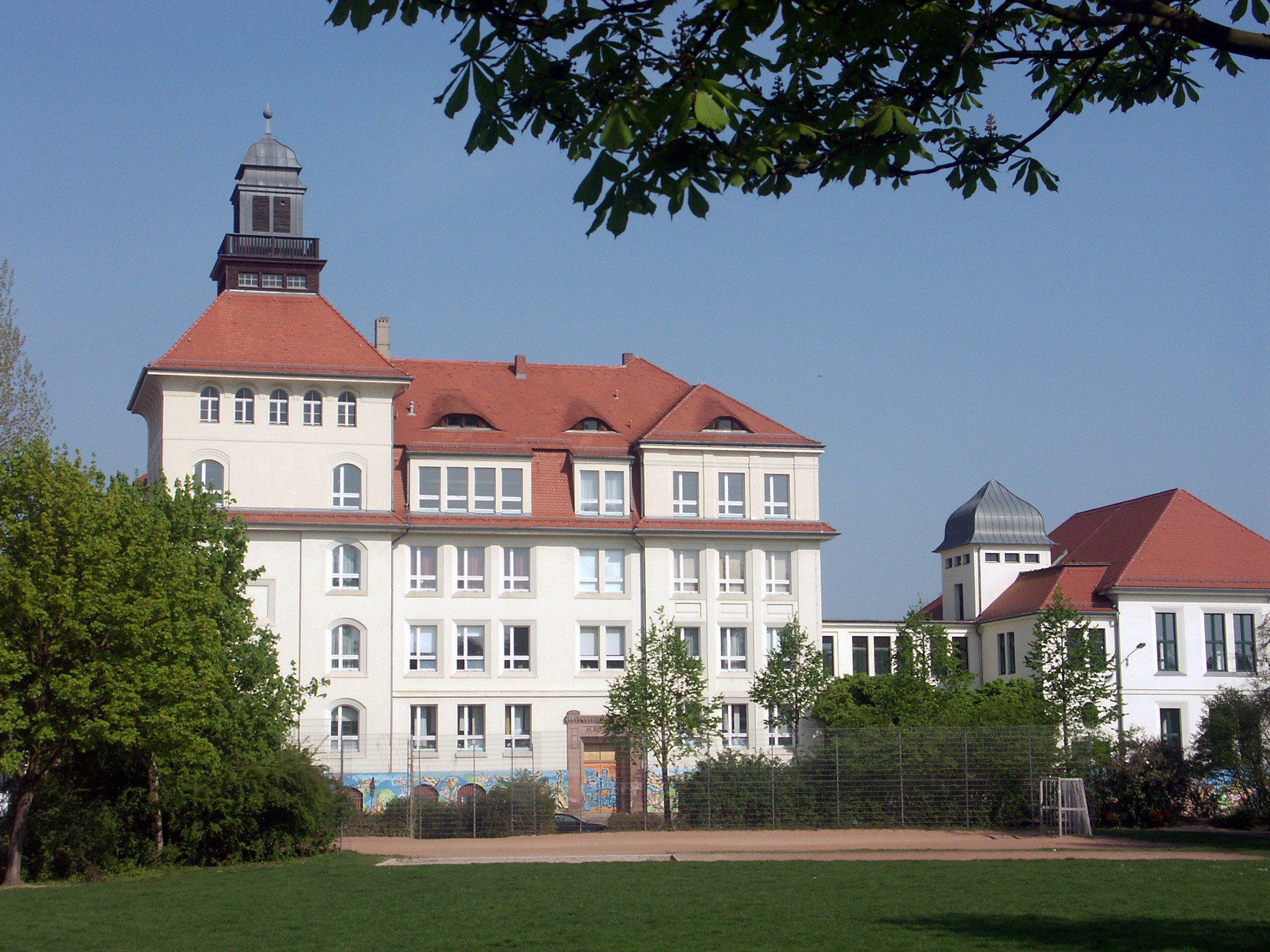 "Schule Connewitz - Grundschule der Stadt Leipzig" an der Hildebrandstraße (ehemals 54. Schule)